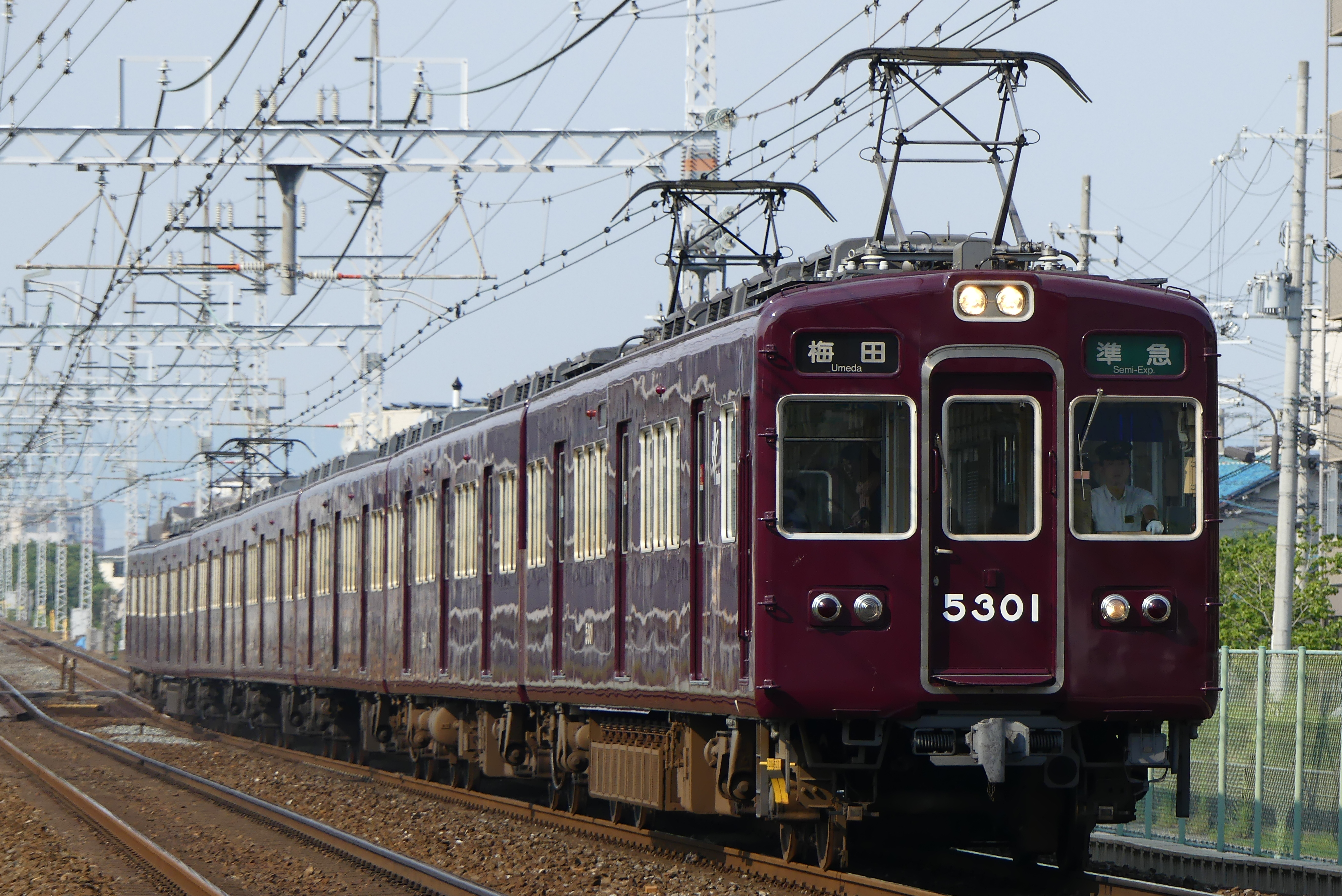 阪急電鉄5300系電車